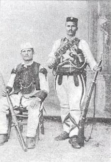 Serbian Chetnik commanders Vasilije Trbić and Petko Ilić